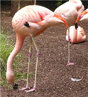 chilieense flamingo eigen foto